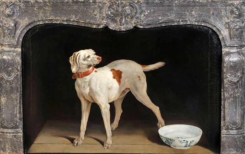 Jean-Baptiste Oudry (Paris, 1686 ; Beauvais, 1755). Chien à la jatte, 1751. Huile sur toile. H. 0,88 ; l. 1,31 m. Dépôt du musée du Louvre. D.V.2006.0.15.1